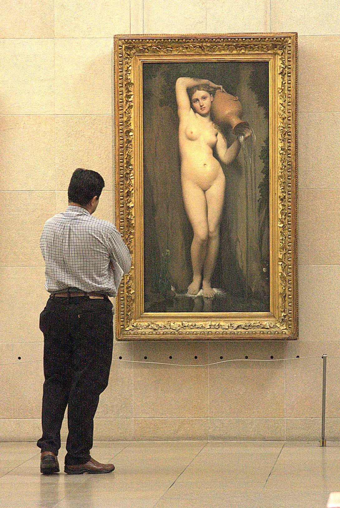 La Source by Ingres, Musée d'Orsay, Paris.